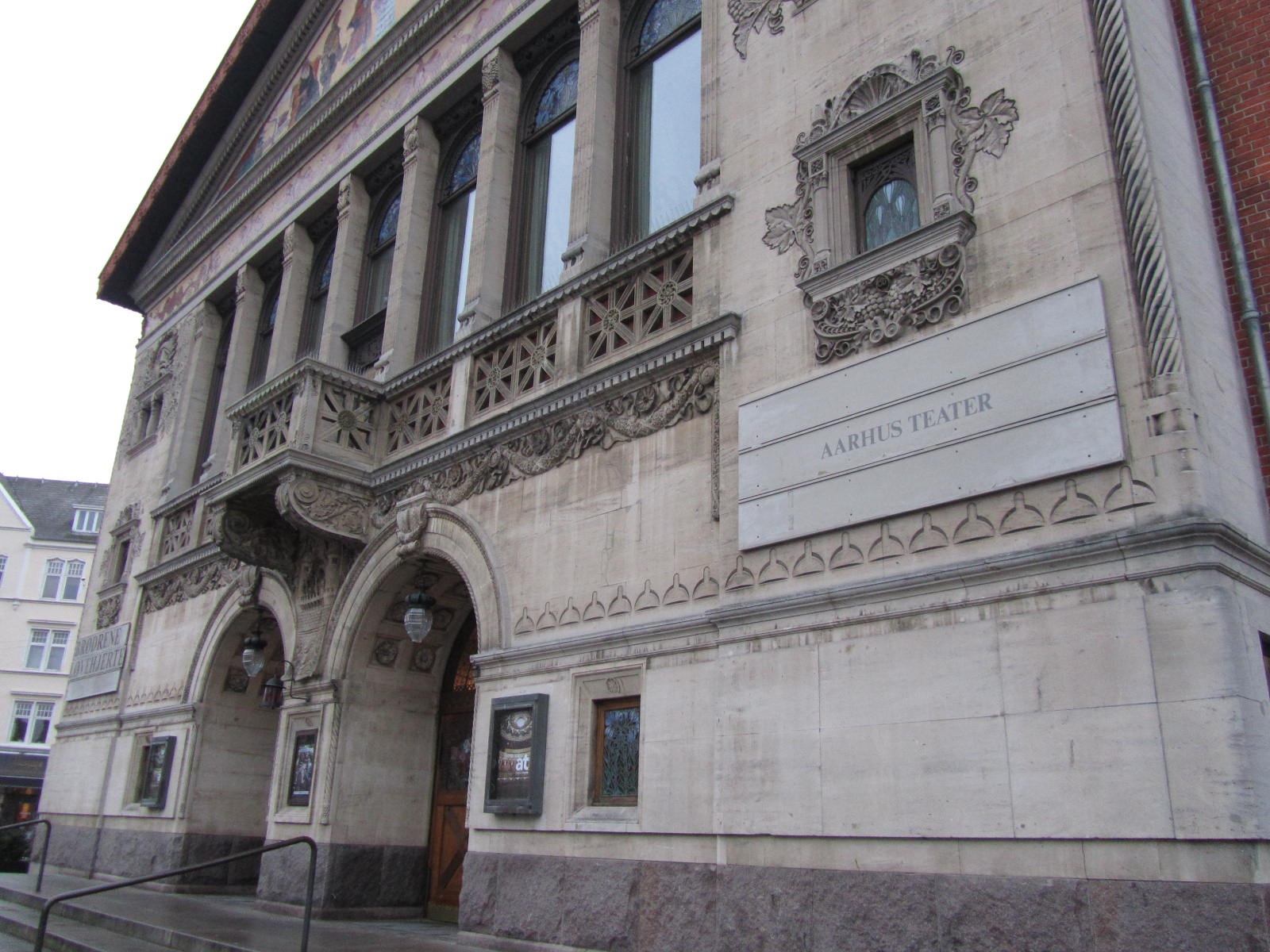 Aarhus´i teatrimaja